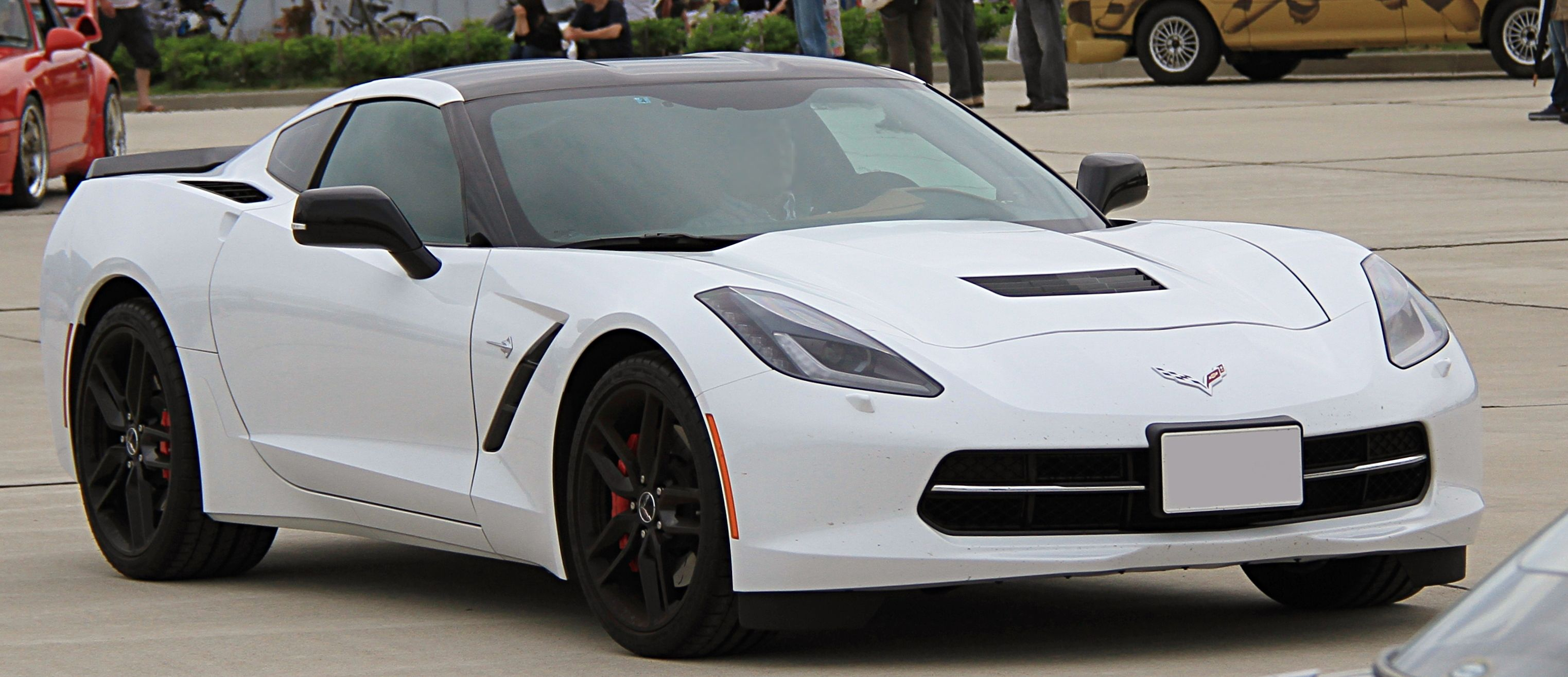 Chevrolet Corvette C7